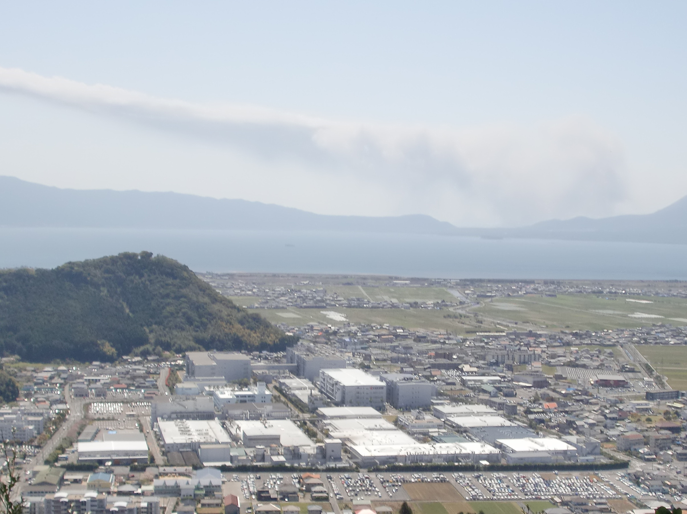 京セラ鹿児島国分工場を城山公園より望む。